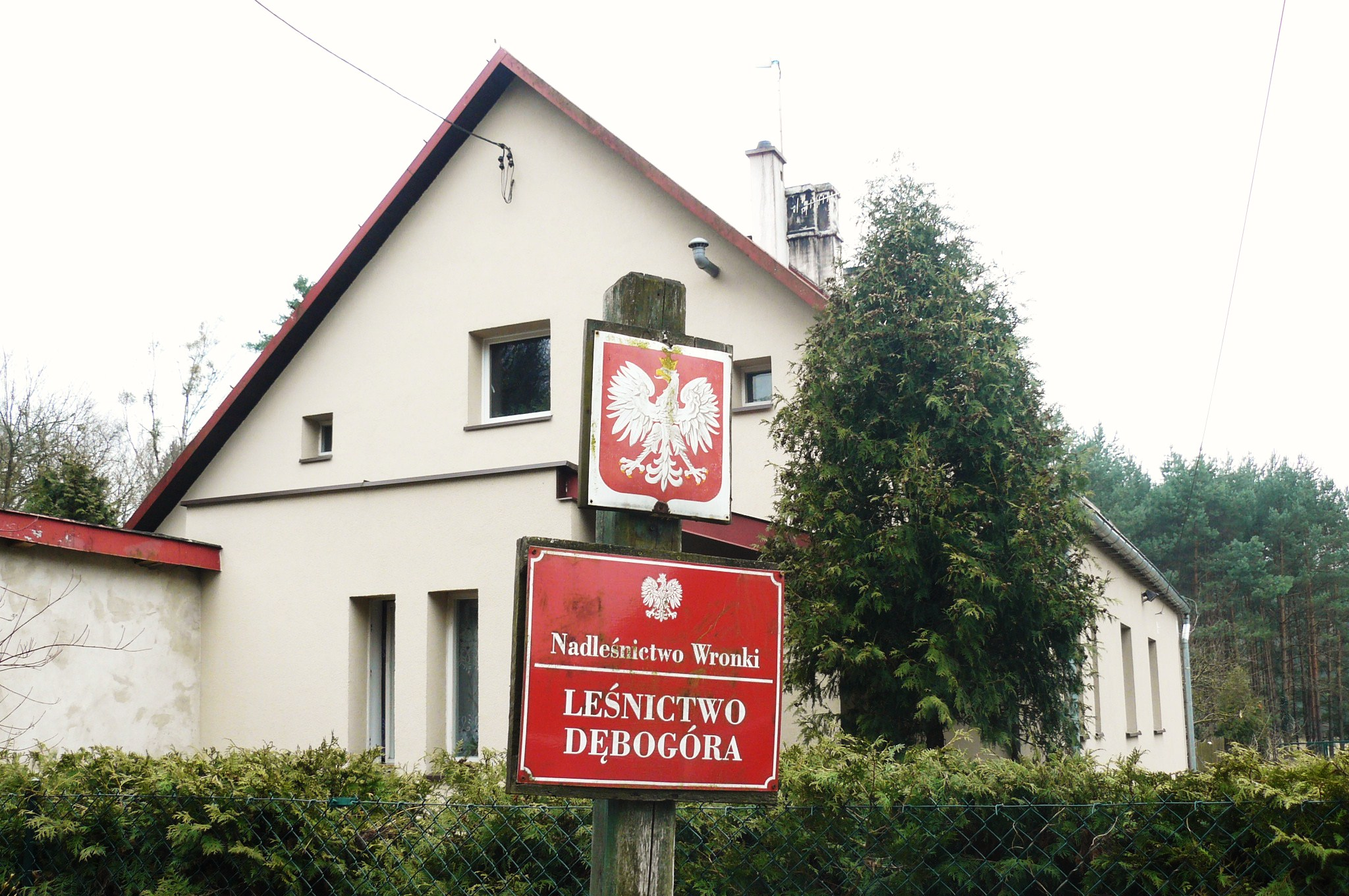 Leśniczówka Dębogóra w Puszczy Noteckiej.